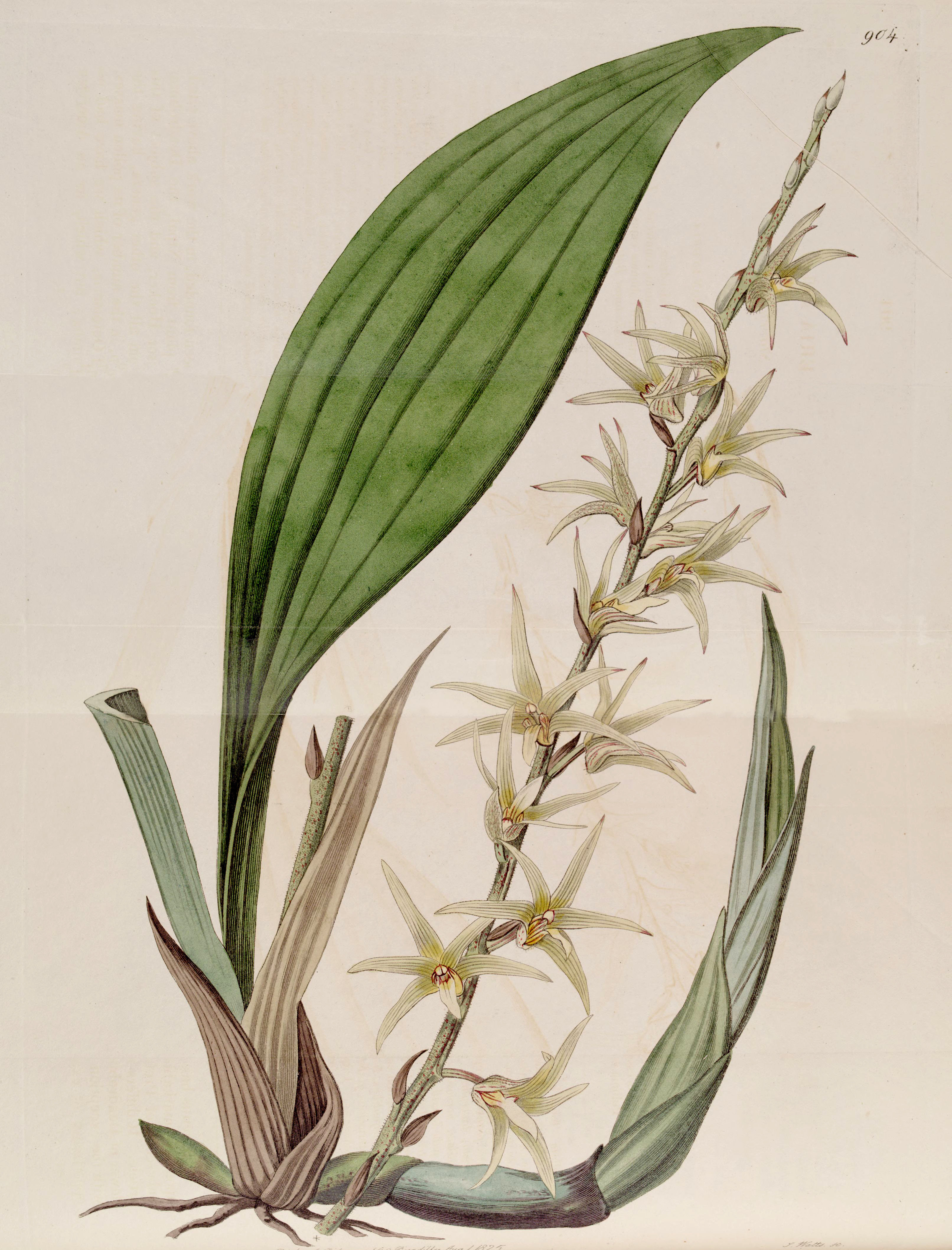 Illustration of Eria javanica (as syn. Eria stellata)